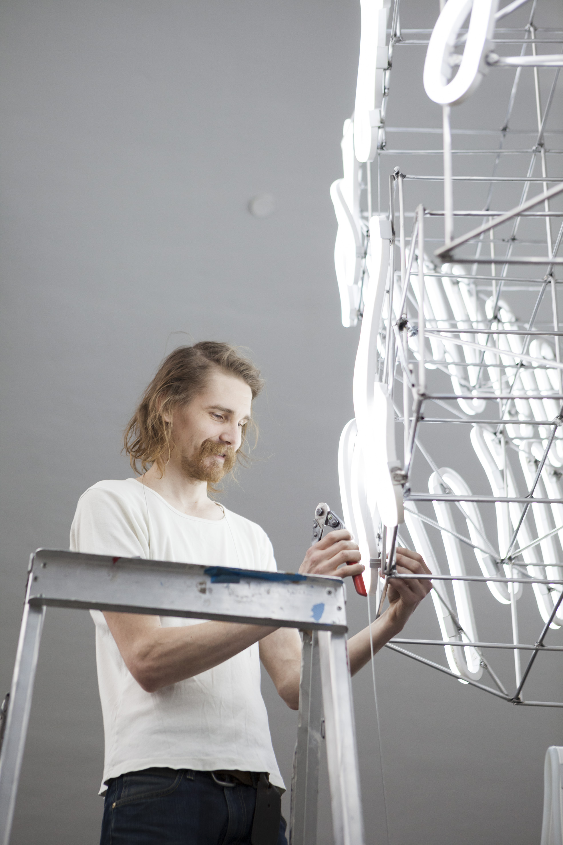 taiteilijat Anssi Pulkkinen&Taneli Rautiainen: Dialog artists Anssi Pulkkinen&Taneli Rautiainen: Dialog in Kiasma photo: Kansallisgalleria / Pirje MykkänenFinnish National gallery / Pirje Mykkänen